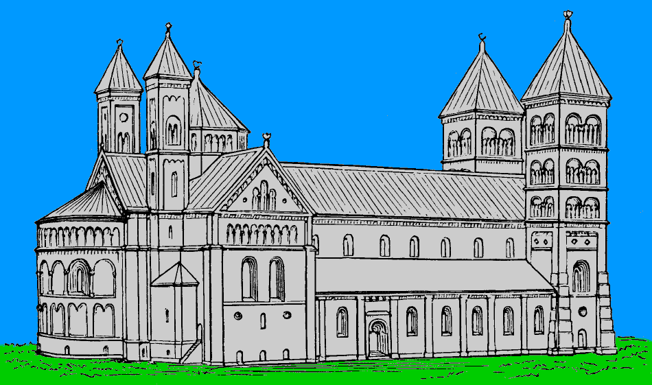 Helgo Zettervalls förslag till ombyggnad av Lunds domkyrka 1863.